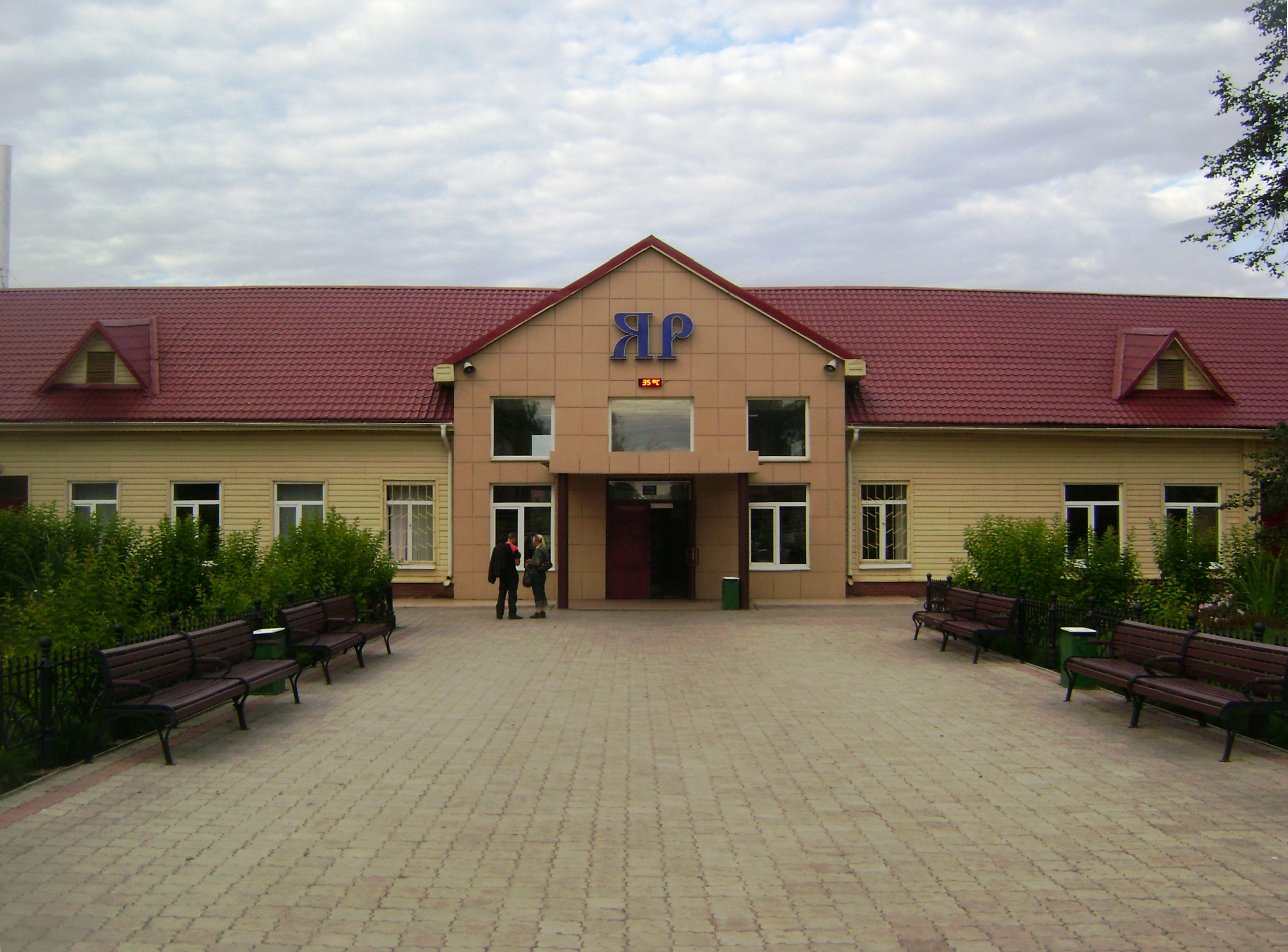 Вокзал в посёлке Яр (Удмуртия)